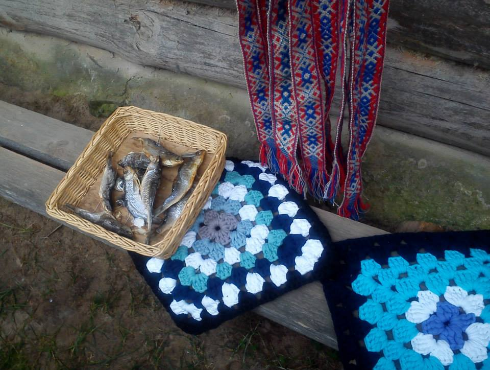 Rybki i rękodzieło w Setomaa, Estonia